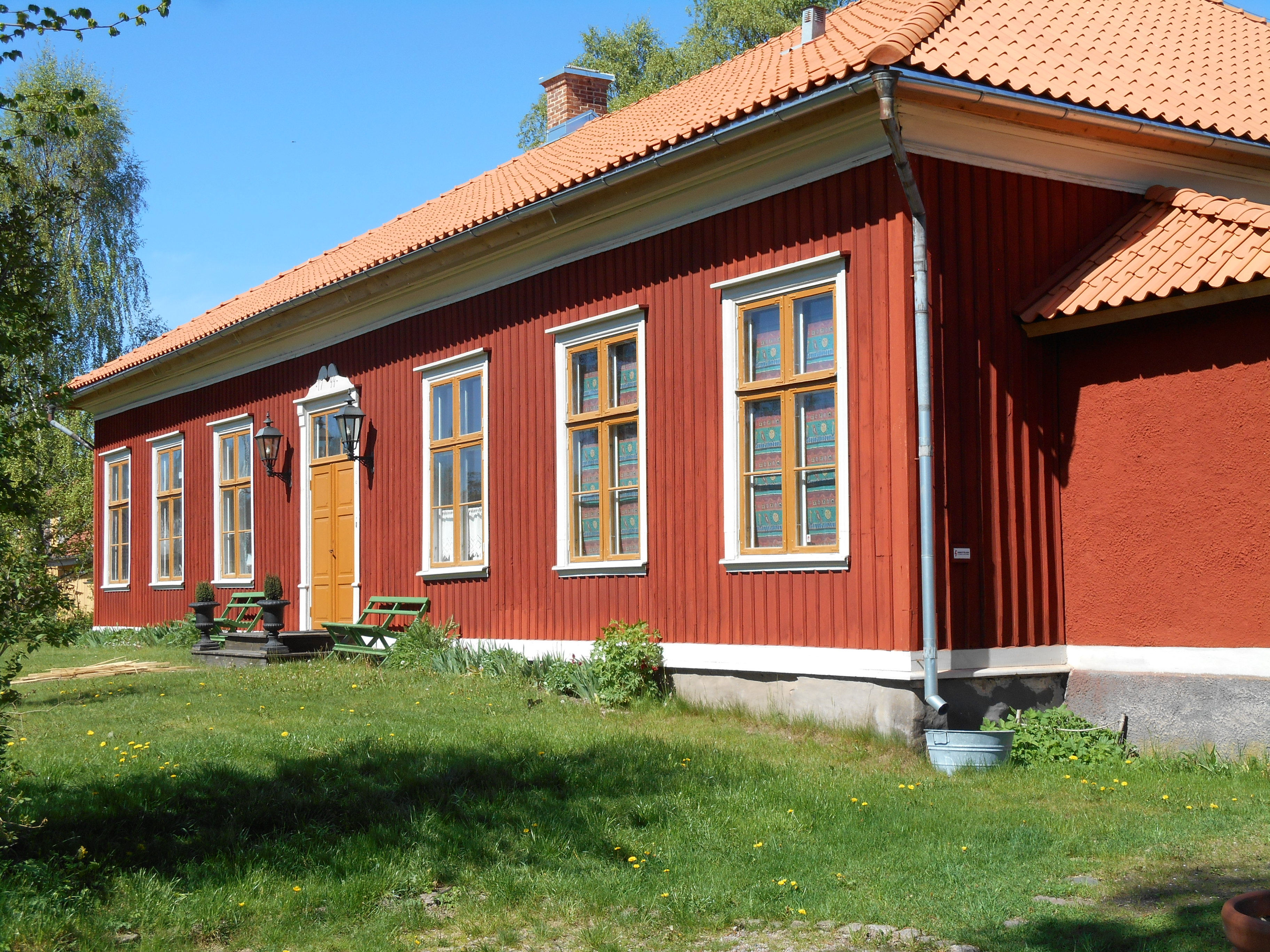 Hullaryds tingshus, tingshus i Norra Vedbo härad 1799-1910